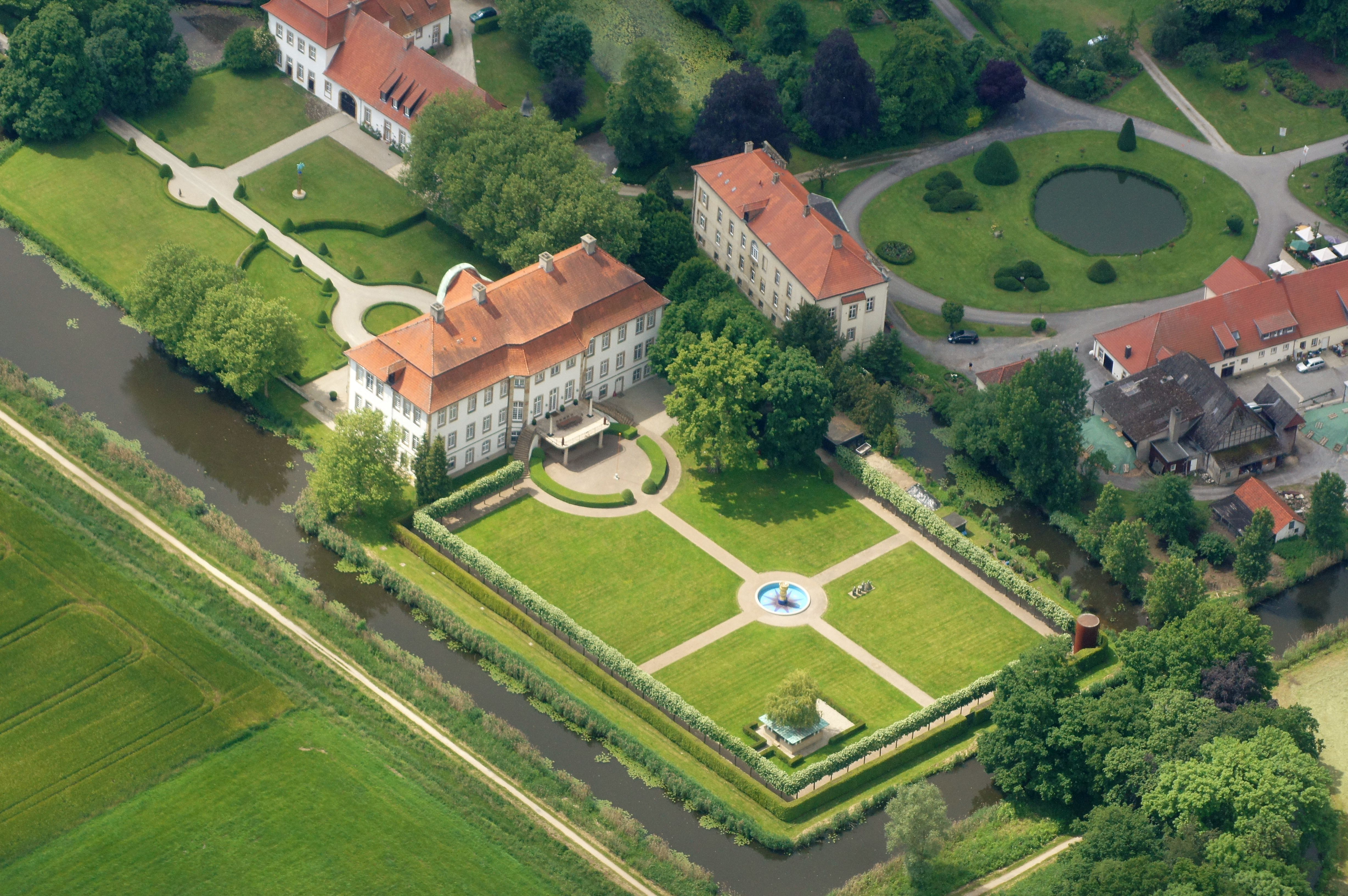 Bei Schloss Harkotten in Füchtorf bei Sassenberg, Nordrhein-Westfalen, handelt es sich um eine Doppelschlossanlage. Schloss von Ketteler ist ein um 1767 fertiggestelltes Barockschloss. Schloss von Korff wurde 1804 bis 1806 im Stil des Klassizismus erbaut. Vorgängerbauten stammten aus dem 14. Jahrhundert. Die Aufnahme entstand während des Münsterland-Fotoflugs am 1. Juni 2014. Hinweis: Die Aufnahme wurde aus dem Flugzeug durch eine Glasscheibe hindurch fotografiert.